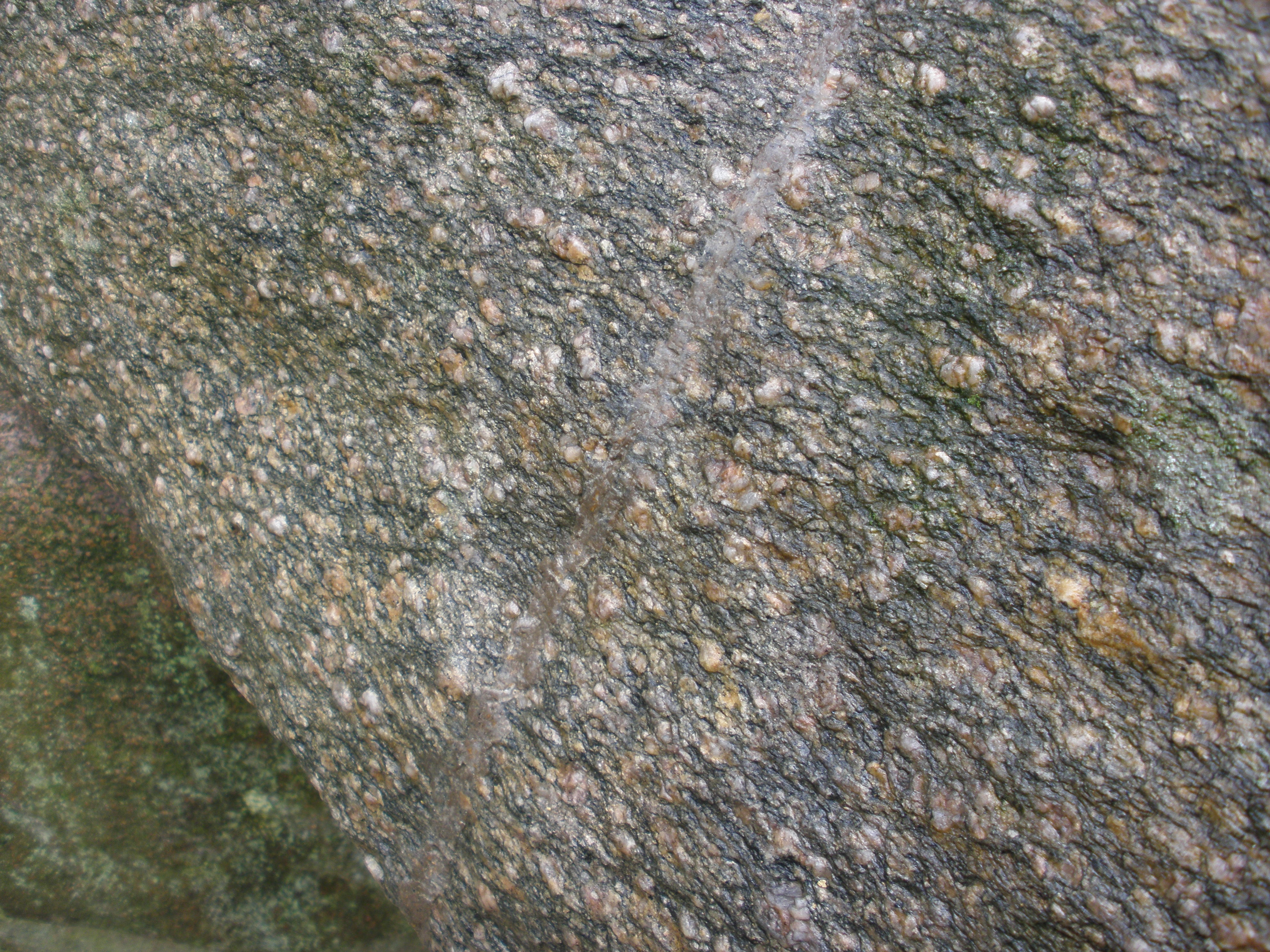 Op woensdag 6 juli 2011 werd hunebed D45 zwaar beschadigd aangetroffen. Een deksteen was gescheurd doordat er de nacht ervoor een vuurtje onder gestookt was. De steen is inmiddels gelijmd, maar de scheur is nog zichtbaar.